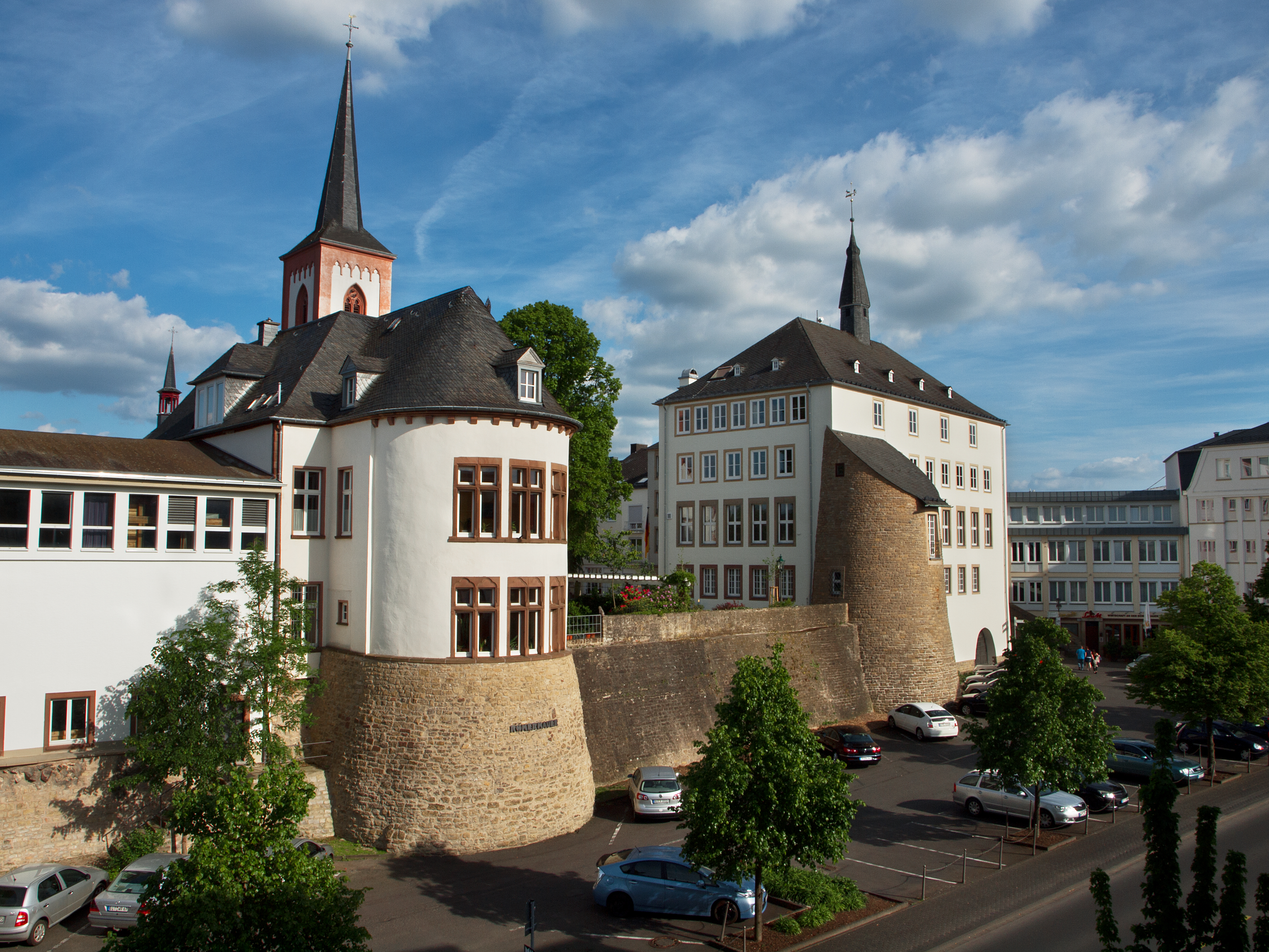 Römermauer